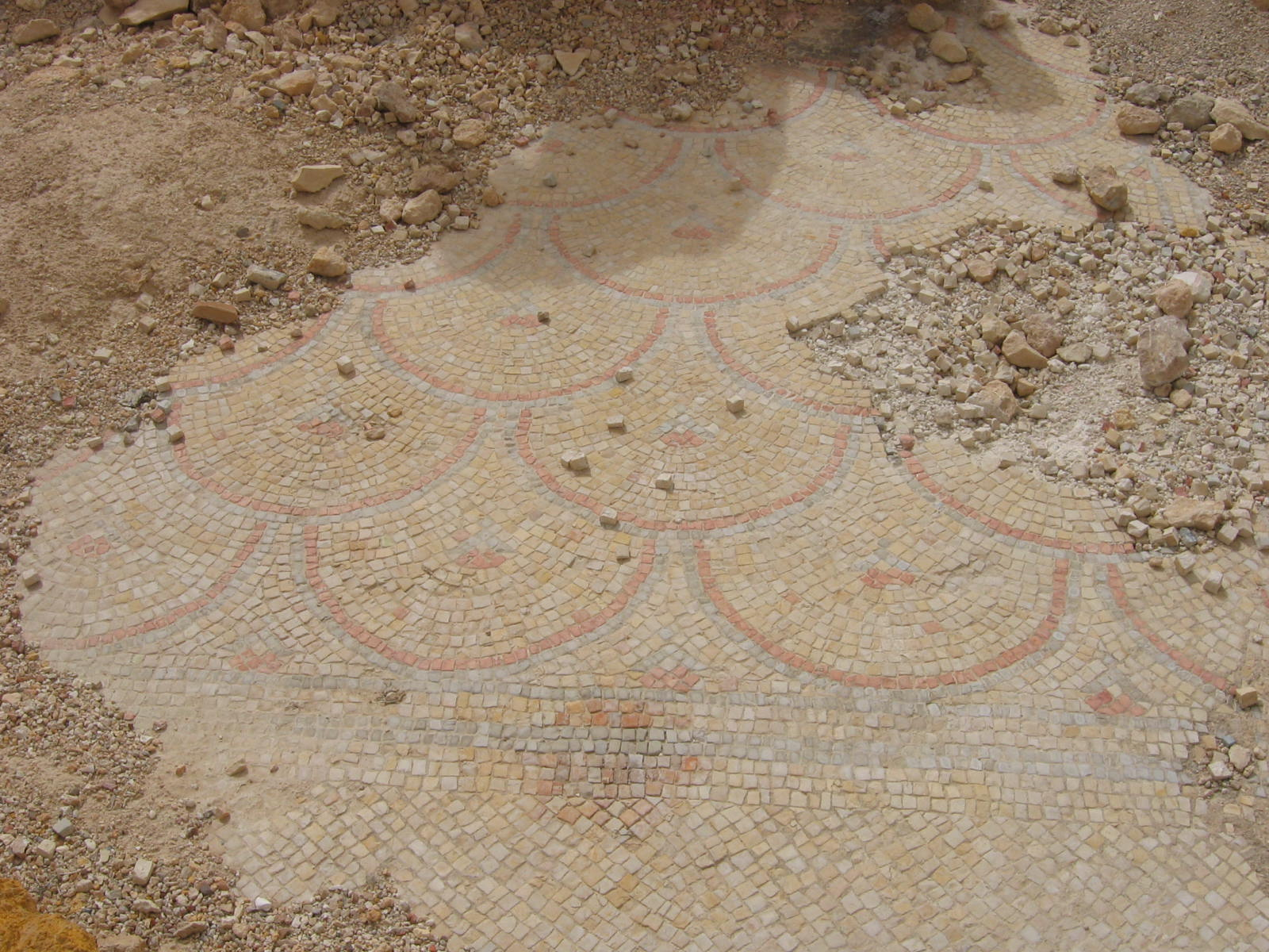 פסיפס בהורקניה